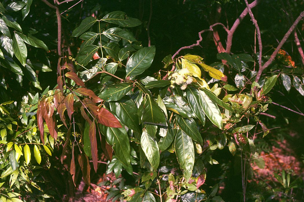 Archidendron quocense, Fabaceae, Mimosoideae - Kambodscha/Cambodia, bei den Stromschnellen (rapids) des Flusses Tek Chhou N Kampot (Prov. Kampot)